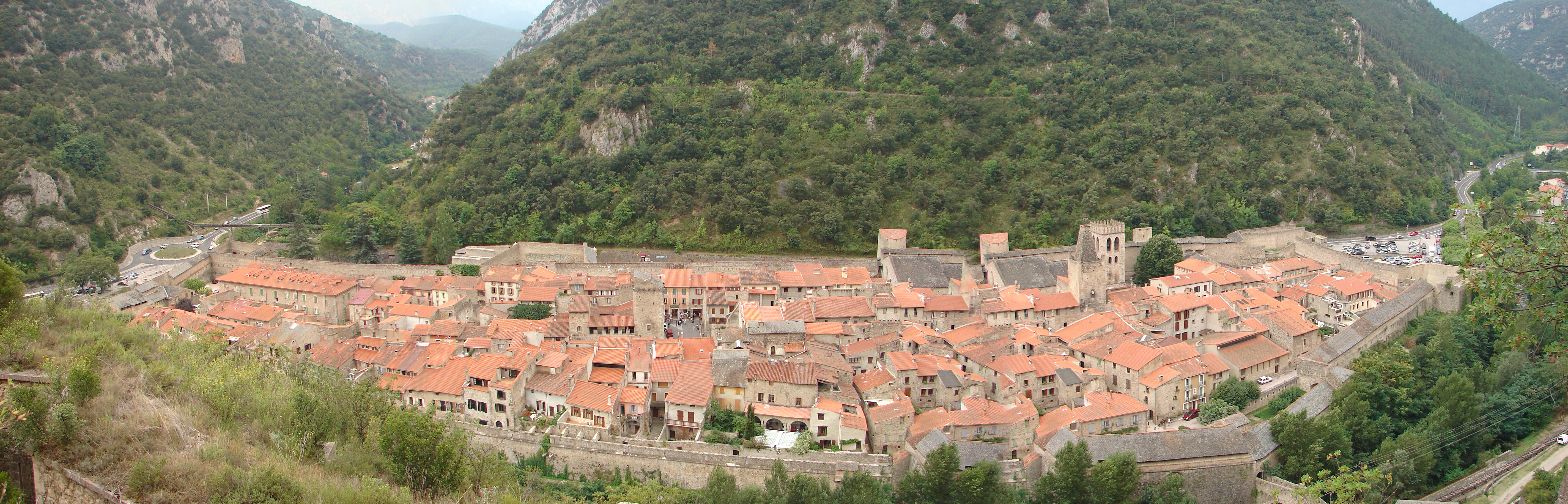 Panorama de la ville de Villefranche-de-Conflent, depuis l'escalier menant au Fort Liberia.